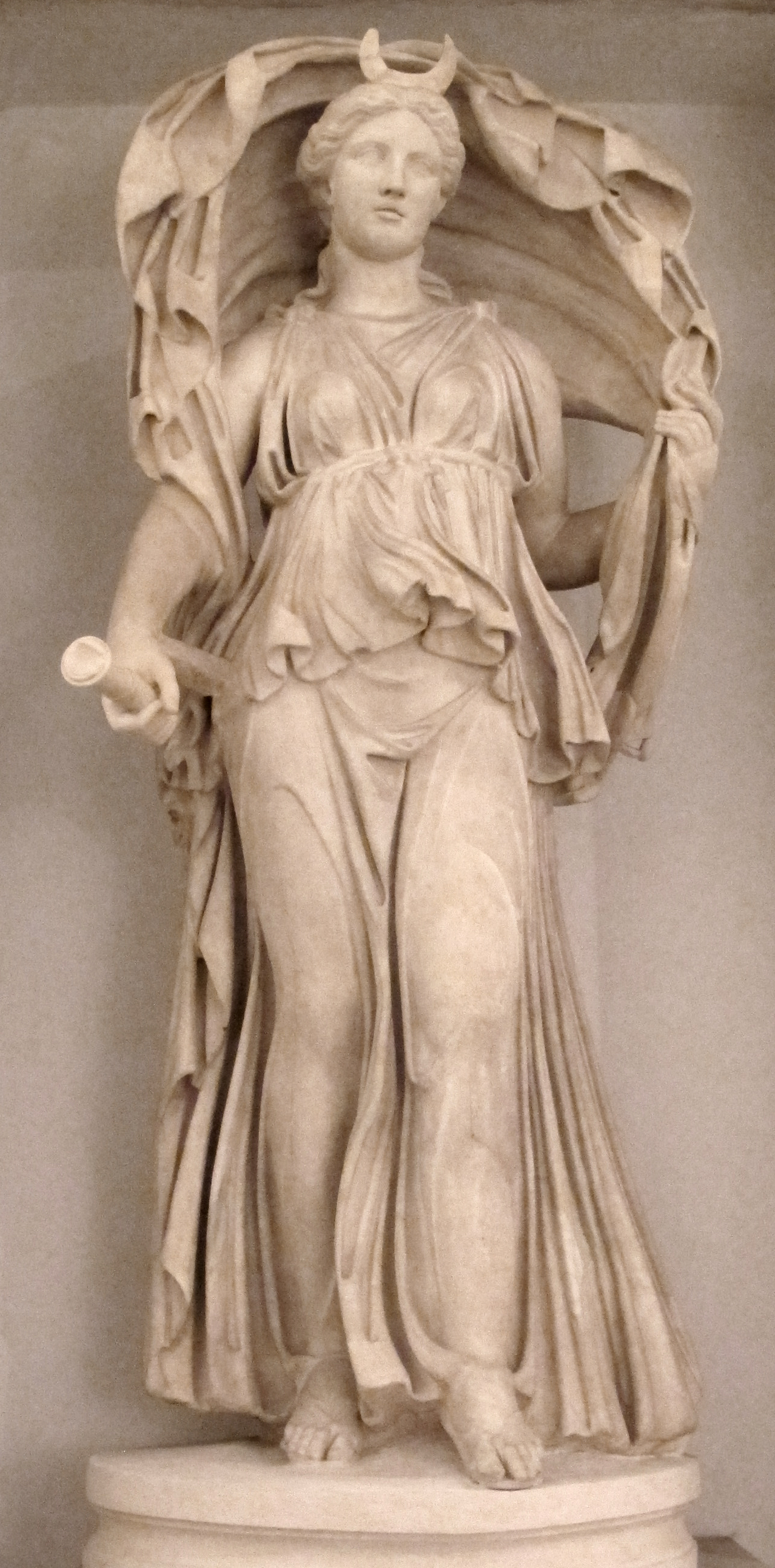 Musei Capitolini. Selene, copia di prima età imperiale di un originale degli inizi del IV secolo a.C, Inventario Sculture S 256